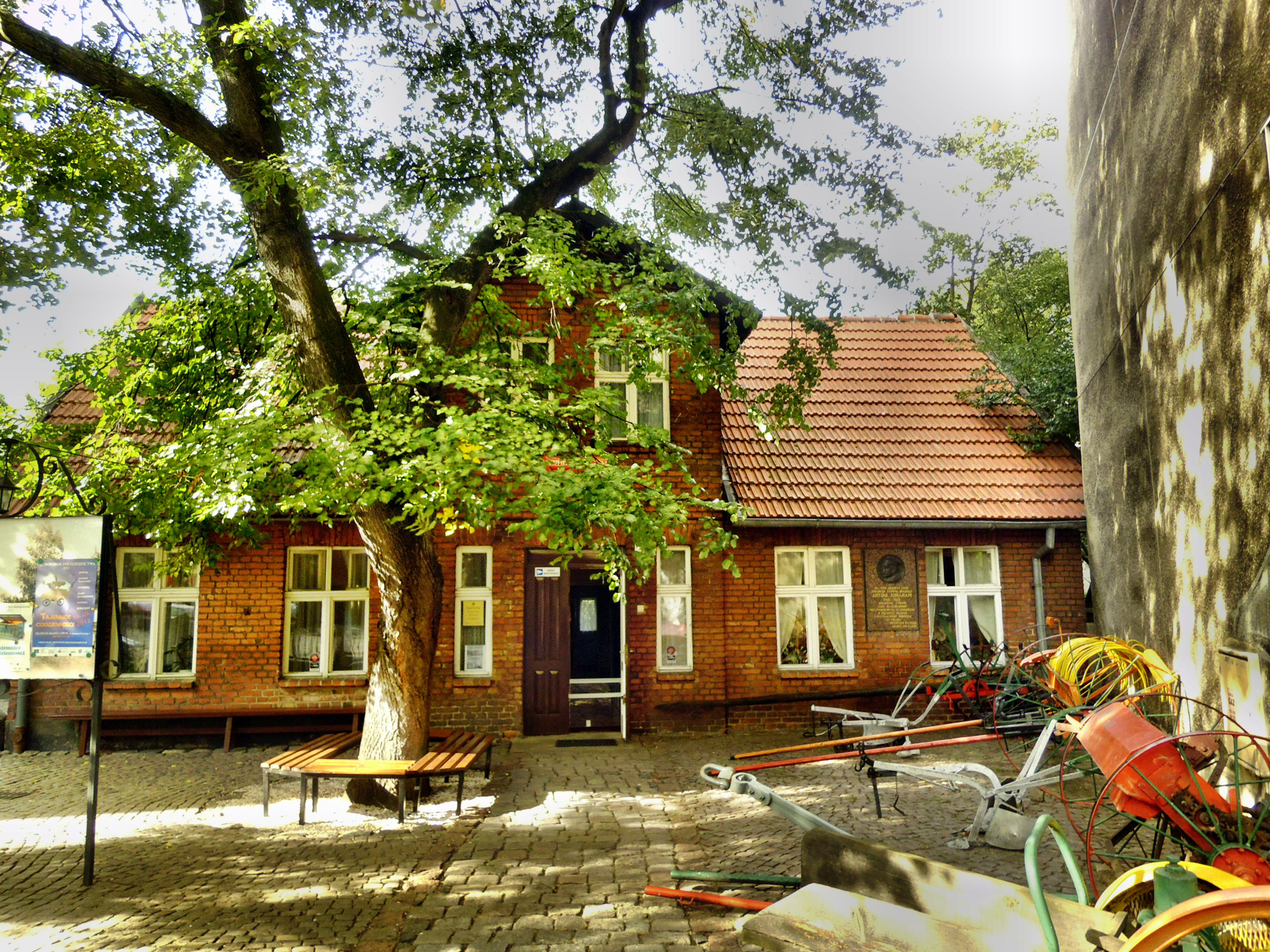 Gdynia, ul. Starowiejska 30 - Dom Antoniego Abrahama, obecnie oddział Muzeum Miasta Gdyni, 1904